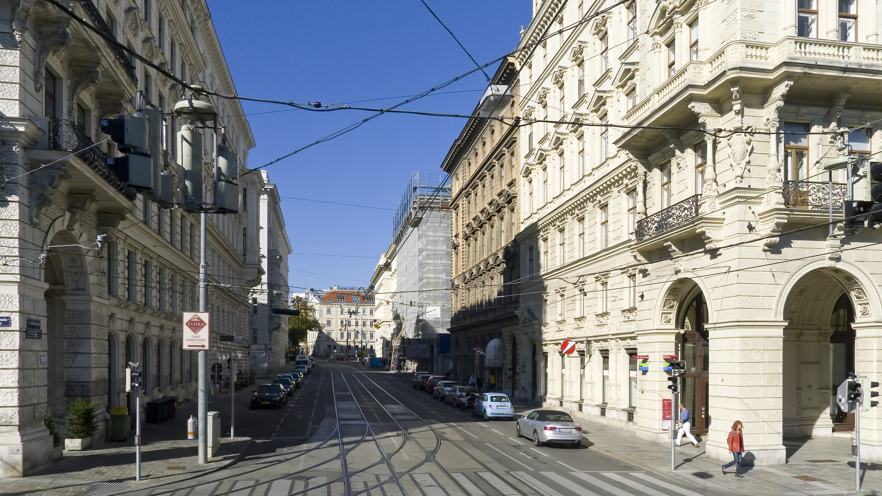 Stadiongasse in Wien 1 bei der Reichsratsstraße Richtung Westen